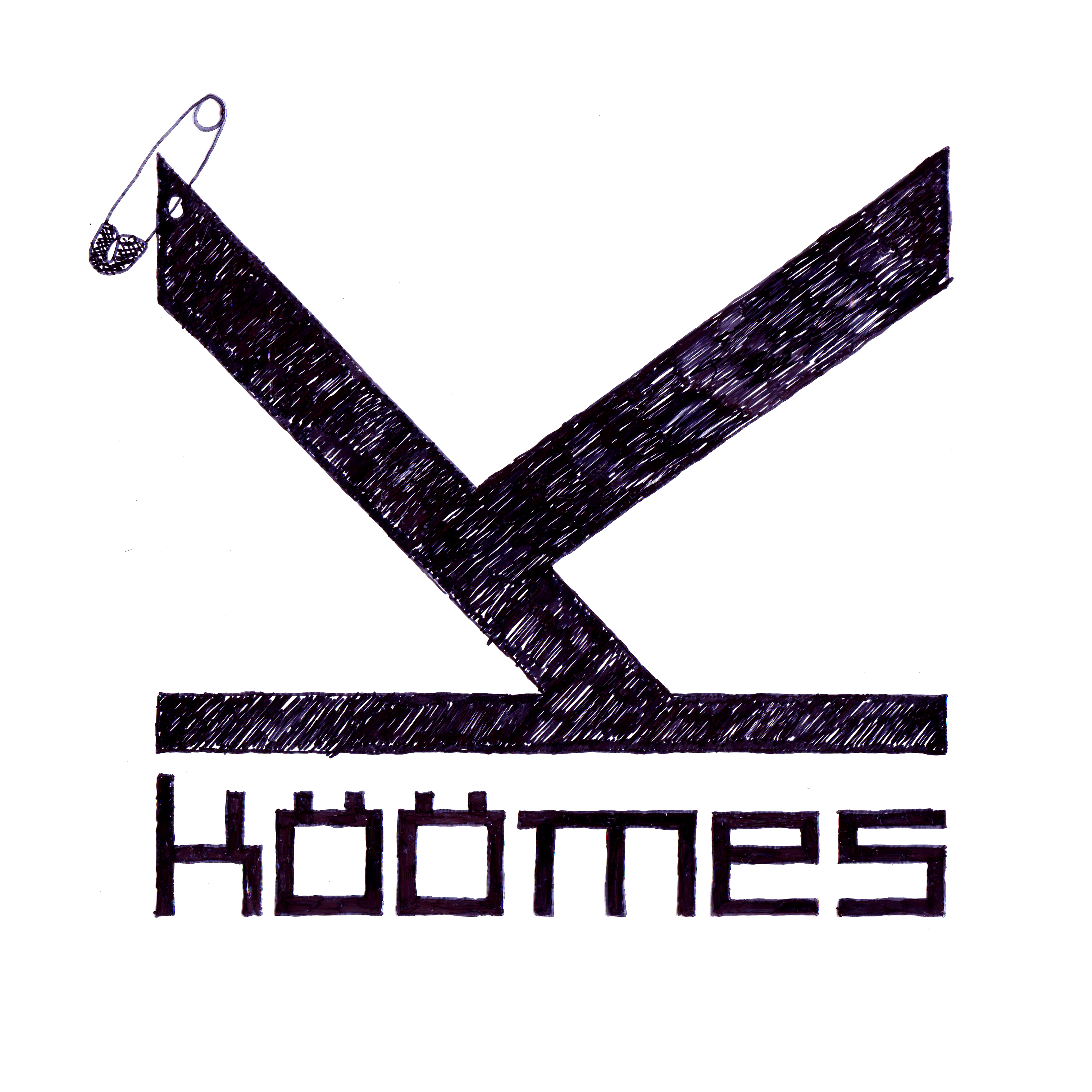 Köömese logo või täht "köö" on loodud tuntud löökpillimängija Jaak Aheliku idee najal Paul Aguraiuja ja Tanel Teemuski poolt aastal 2009